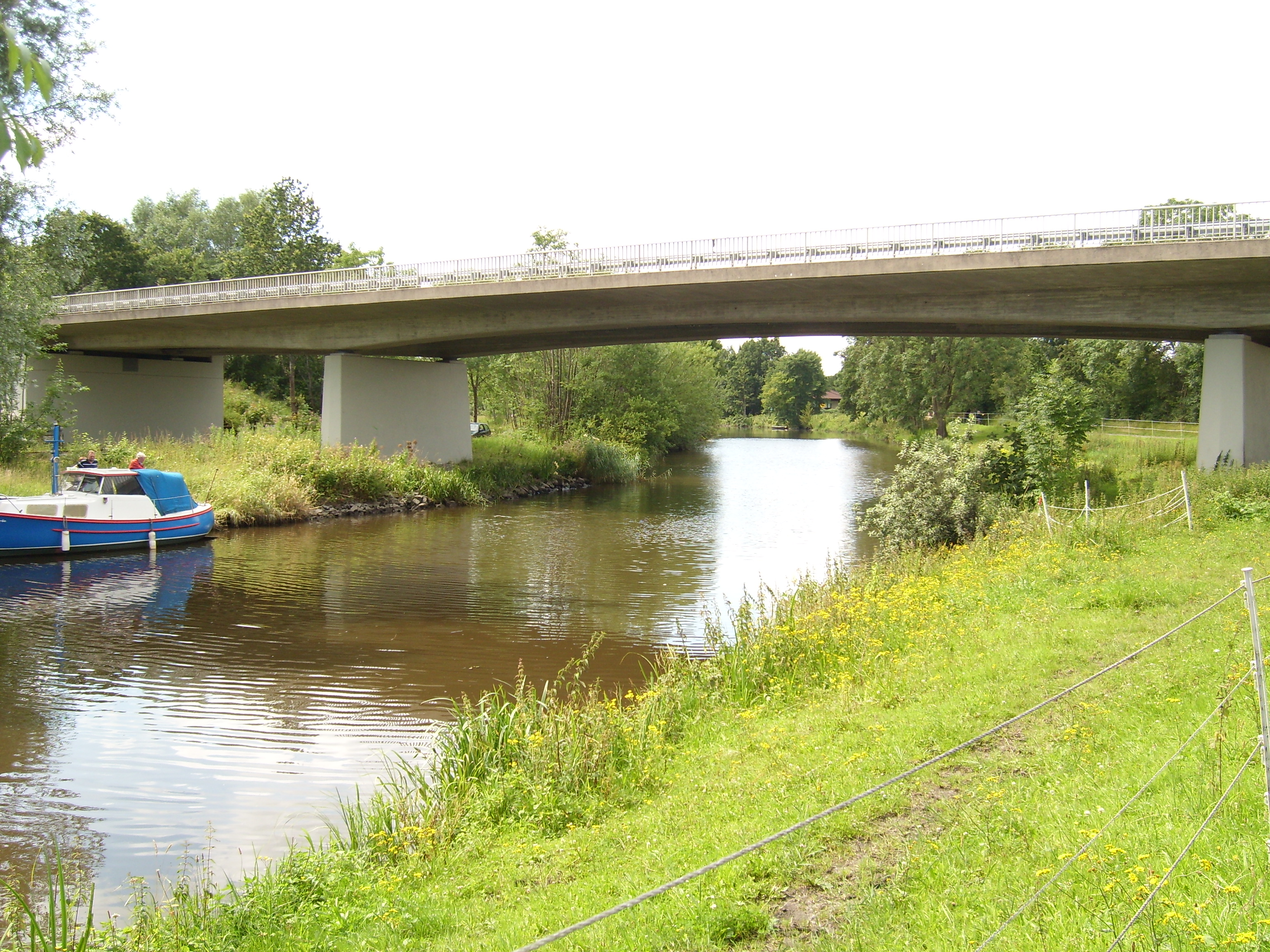 B5-Brücke über die Wilsterau (Blick flussaufwärts) in der Gemeinde Landrecht